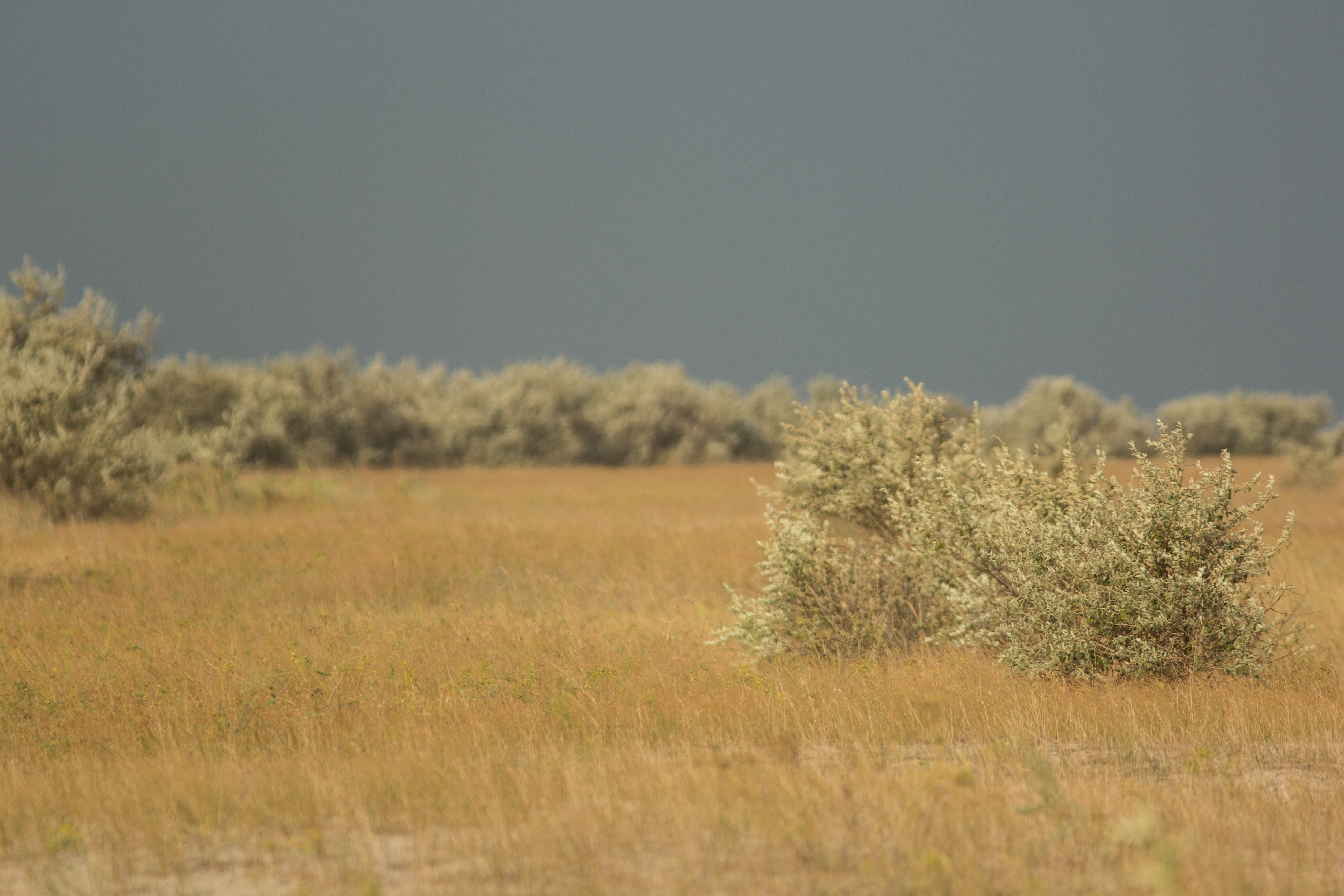 Знято під час експедиції на о. Джарилгач This photo/video of Dzharylhach was taken during Wikiexpedition to Dzharylhach supported by Wikimedia Ukraine. You can see all photographs in category Category:Wikiexpedition to Dzharylhach. English | українська | +/−